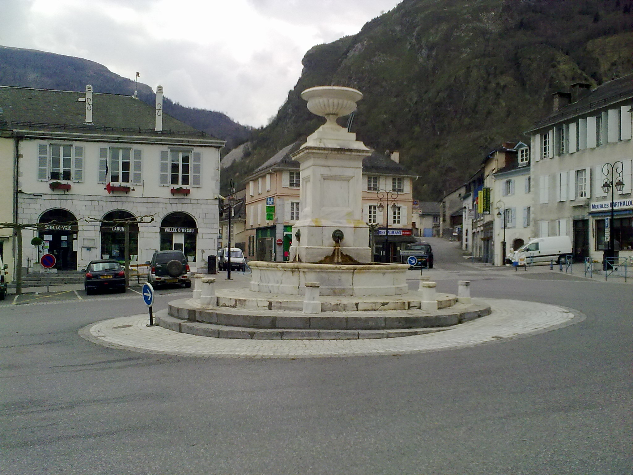 Laruns